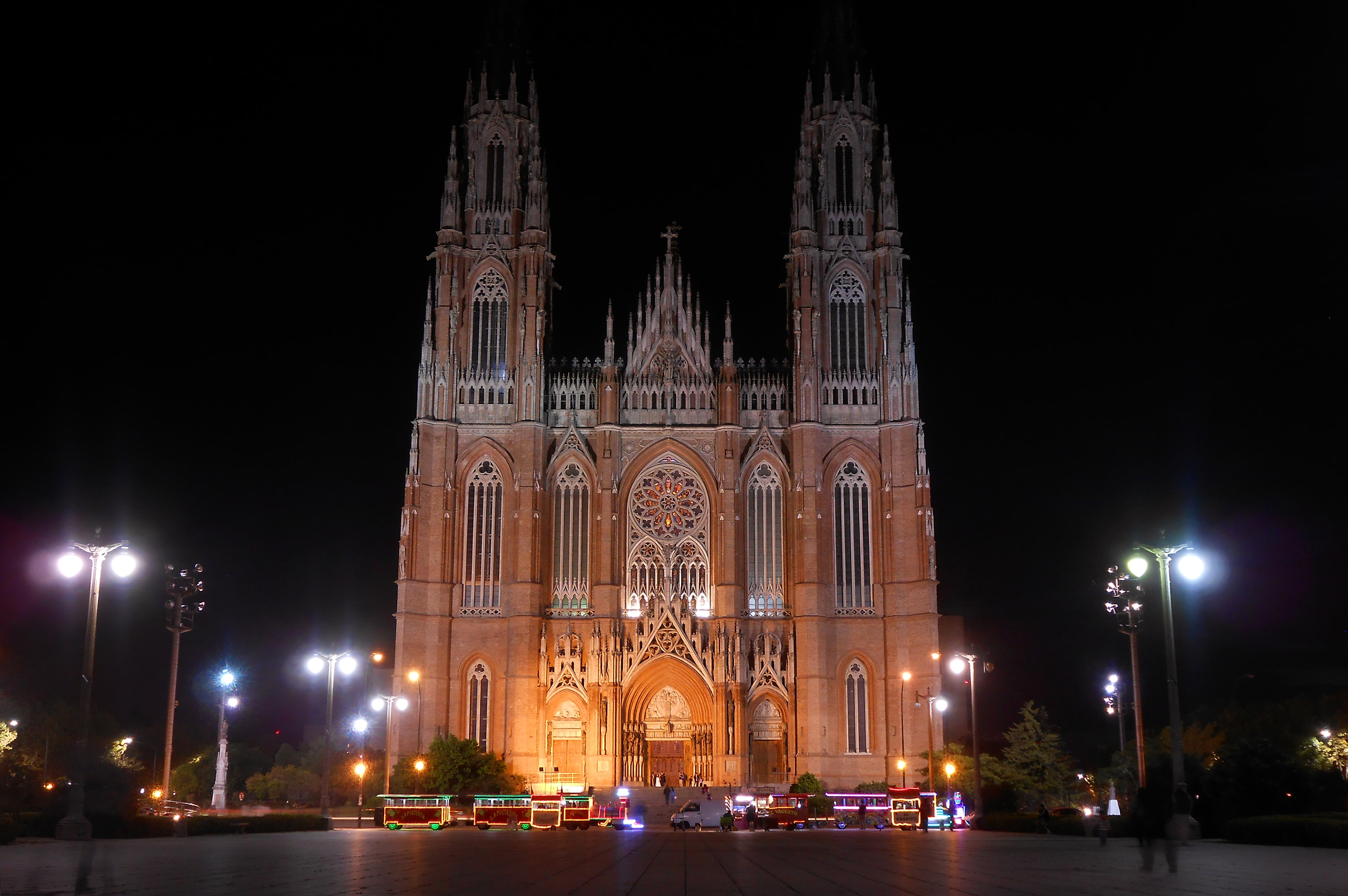 Catedral de La Plata: vista nocturna - Buenos Aires - Argentina